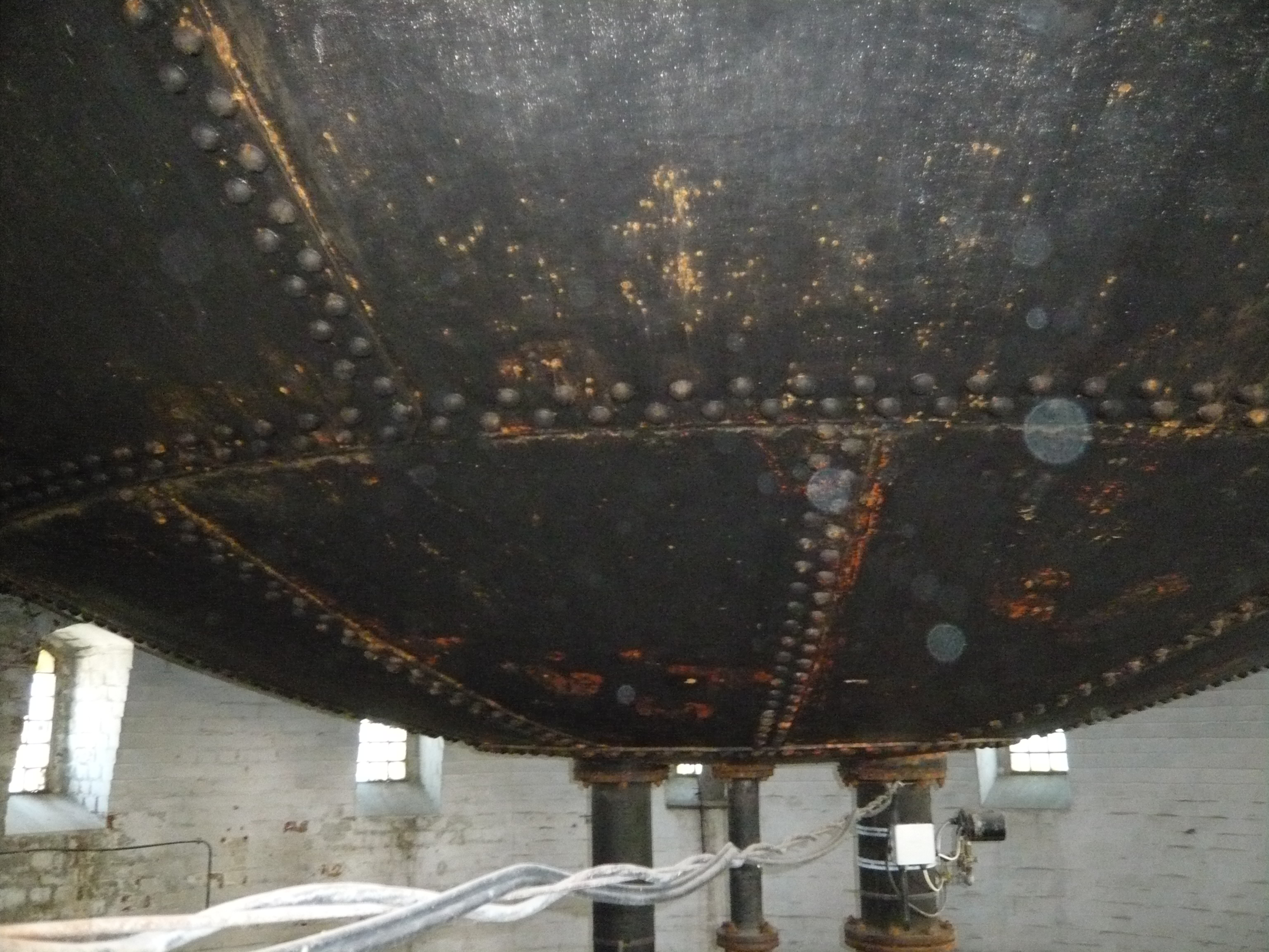 Bernau bei Berlin, Wasserturm: Kessel, Untersicht